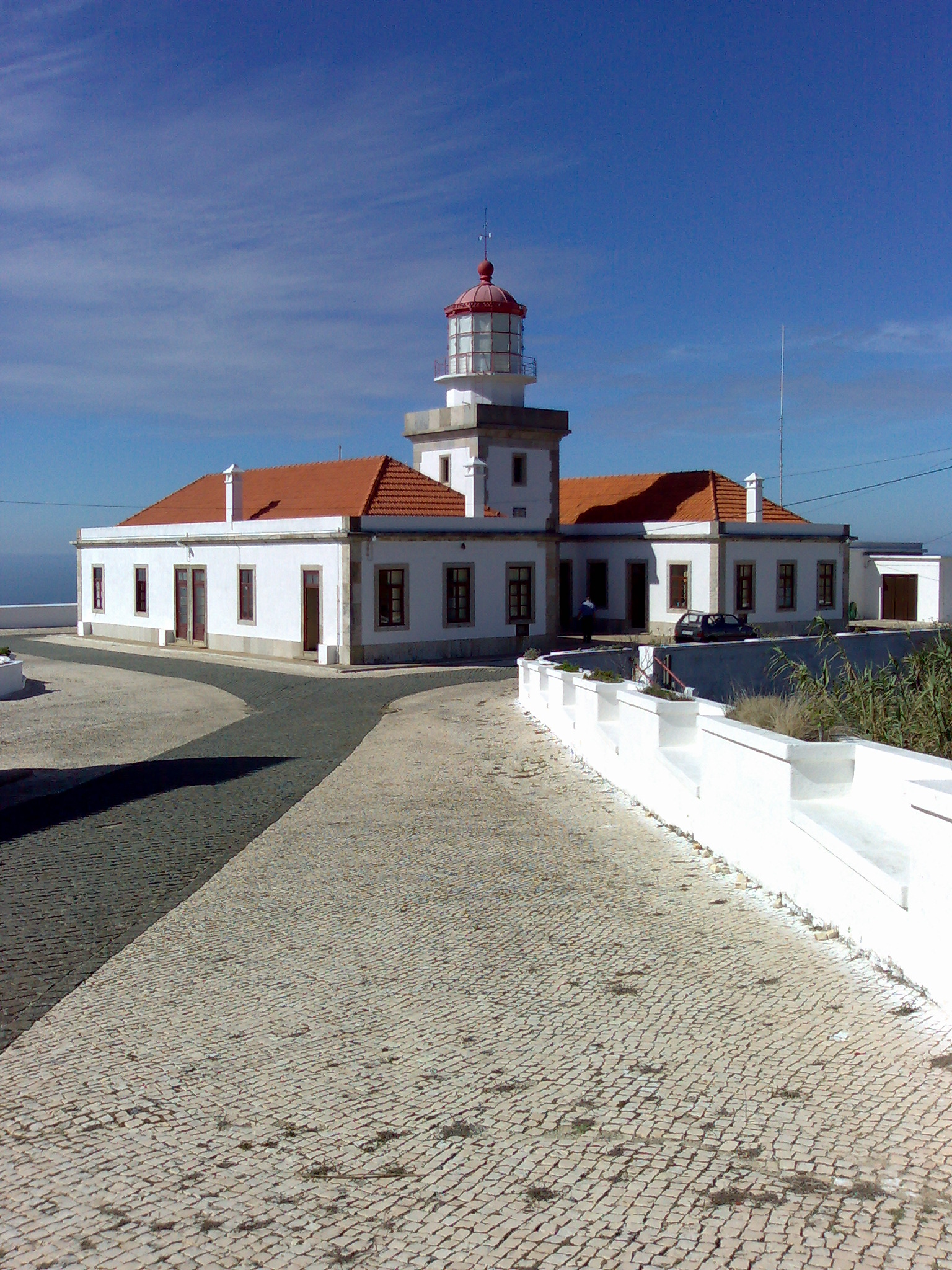 Farol do Cabo Mondego, Figueira da Foz, Portugal (Lighthouse).